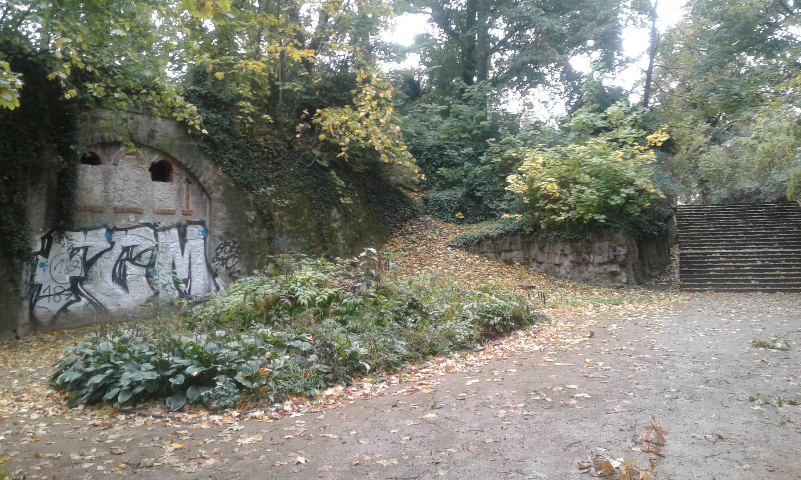 Landschaftsbild